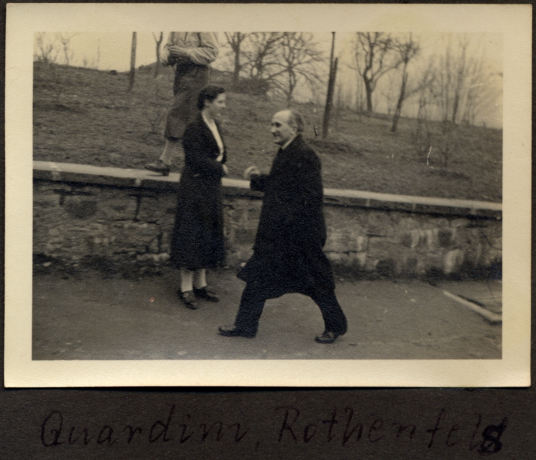 Romano Guardini bei einem Treffen der Quickborn-Bewegung auf Burg Rothenfels in Bayern in den zwanziger Jahren des 20. Jahrhunderts.